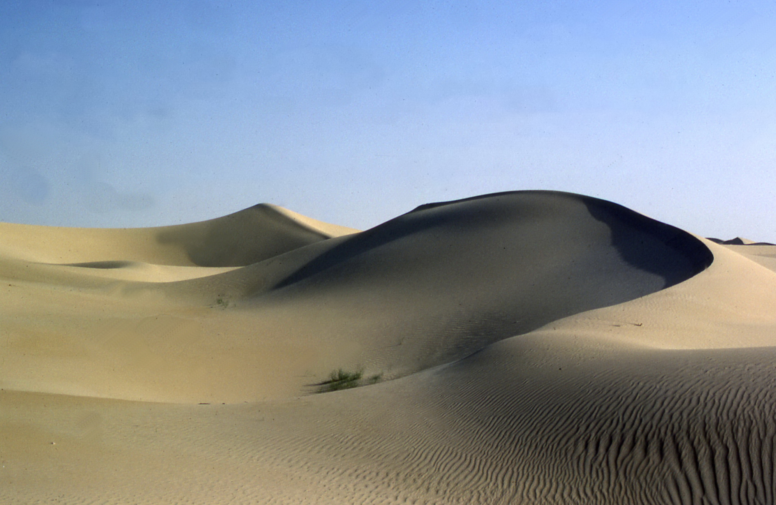 Sahara El Golea 1985. prema In Salahu